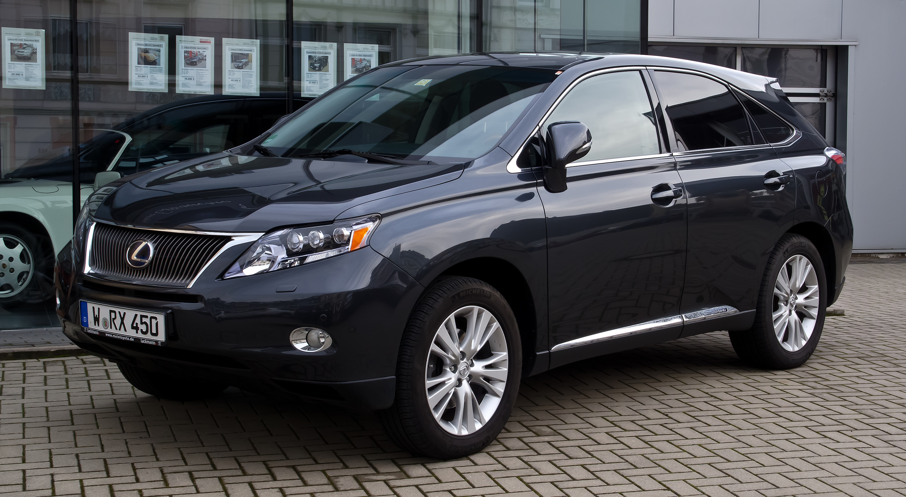 Lexus RX 450h (III)